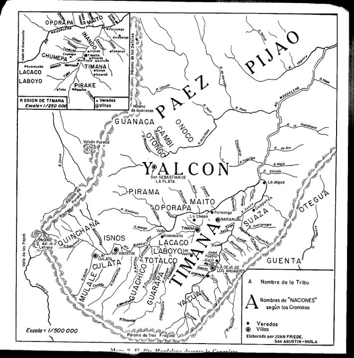 Pueblos Originarios del Alto Magadalena durante la Invasión.